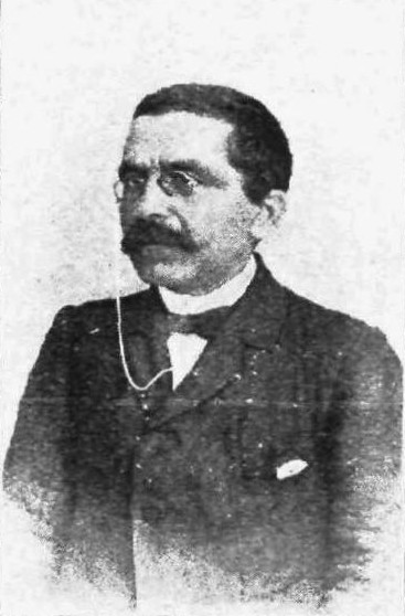 Griechischer Gelehrter, 19. Jahrhundert